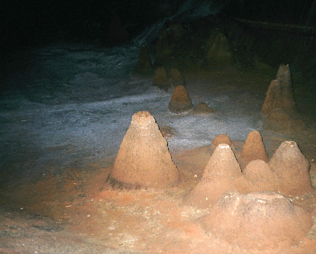 Cave vulcanos on the floor of Gruta da Torrinha, Chapada Diamantina, Bahia, Brasil. Vulcões de caverna no chão da Gruta da Torrinha, Chapada Diamantina, Bahia Brasil.